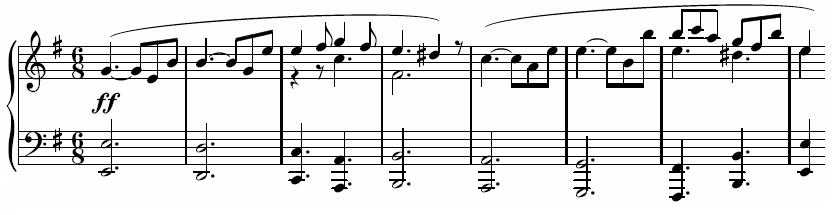 Description : premières mesures du second mouvement de la sonate pour piano n° 30 de Beethoven Auteur : propre travail réalisé avec Lilypond Licence : Domaine public (auteur décédé depuis plus de 70 ans)